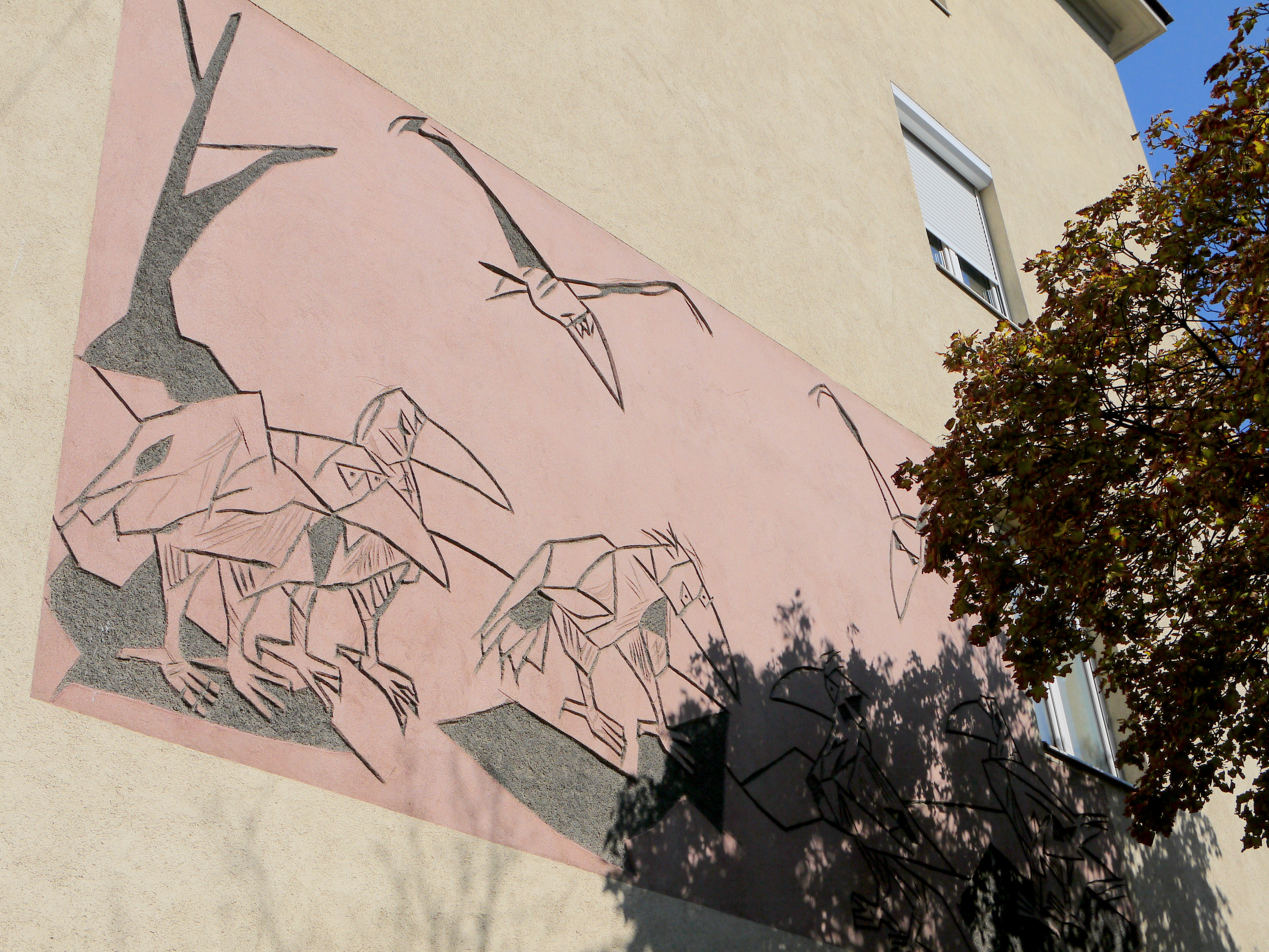 Sgraffito Raben, Sgraffito von Kurt Absolon. Troststraße 18, Favoriten.